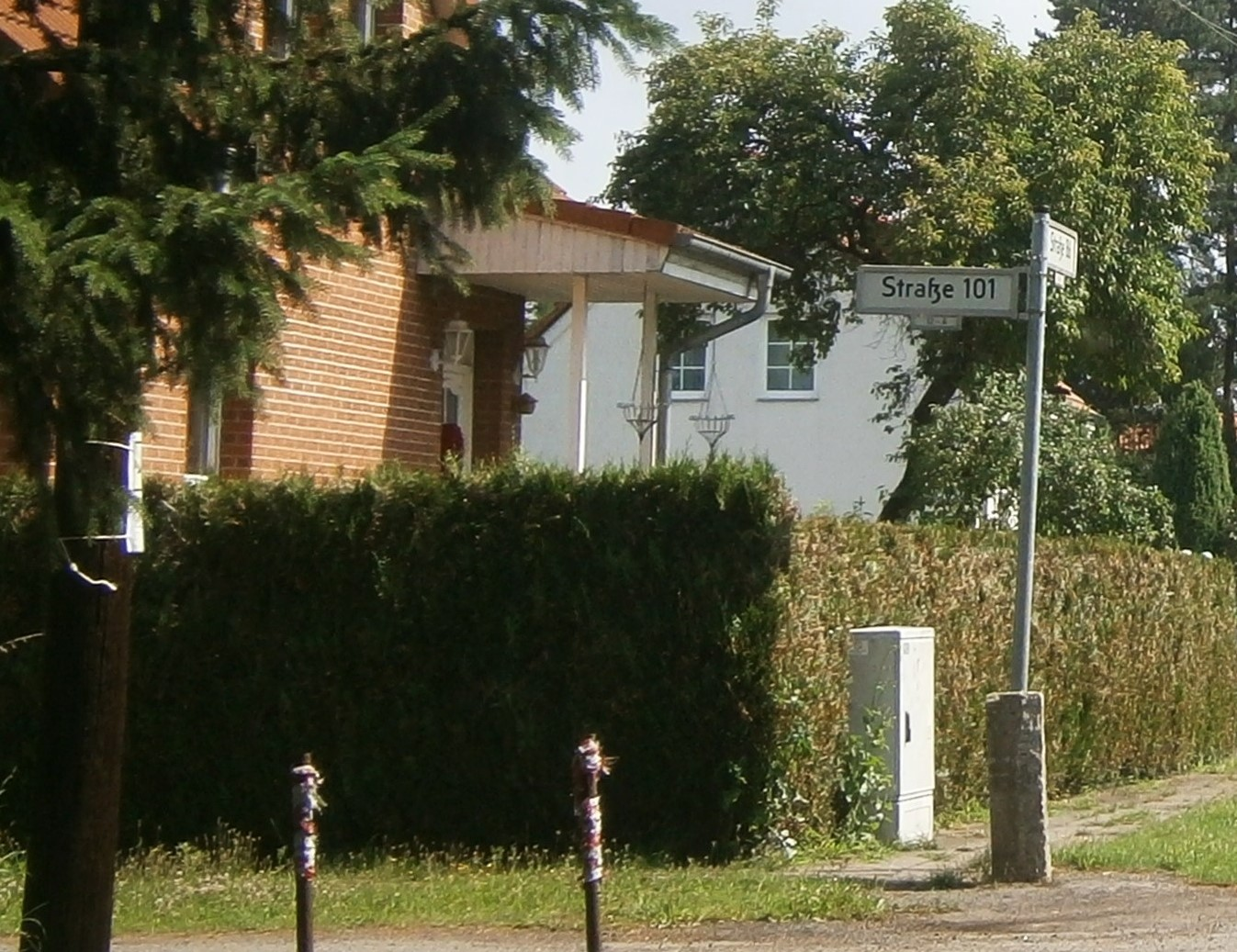 Straßenschild mit einer Nummern-Straße: Straße 101 in Berlin-Karow Ecke Straße 86